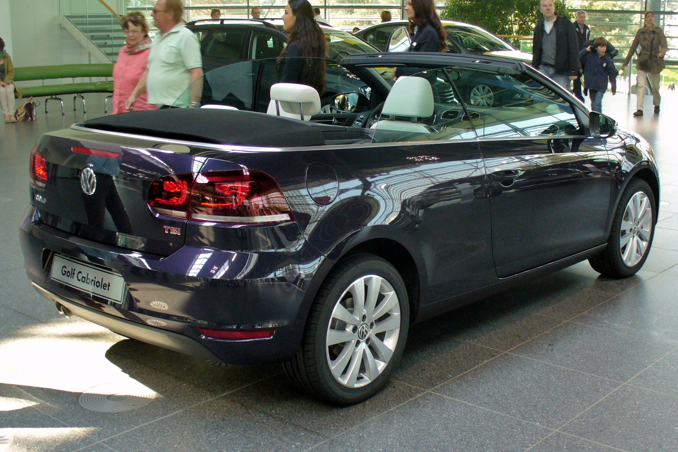 VW Golf VI Cabrio